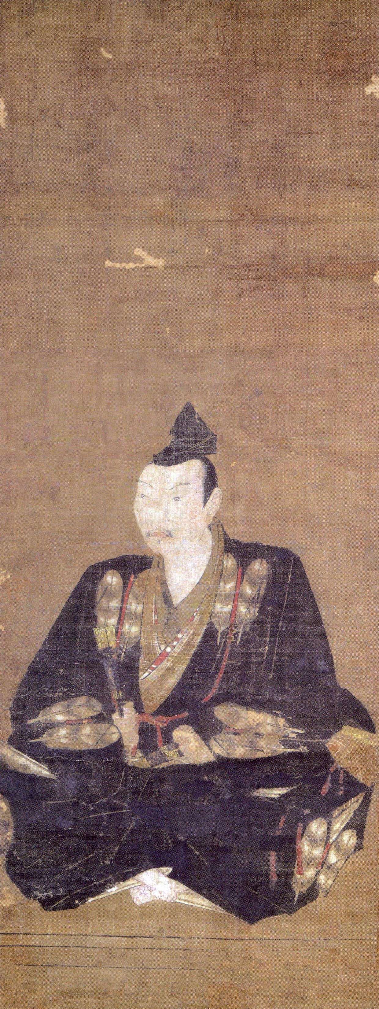 菊池能運像（室町時代/16世紀作）